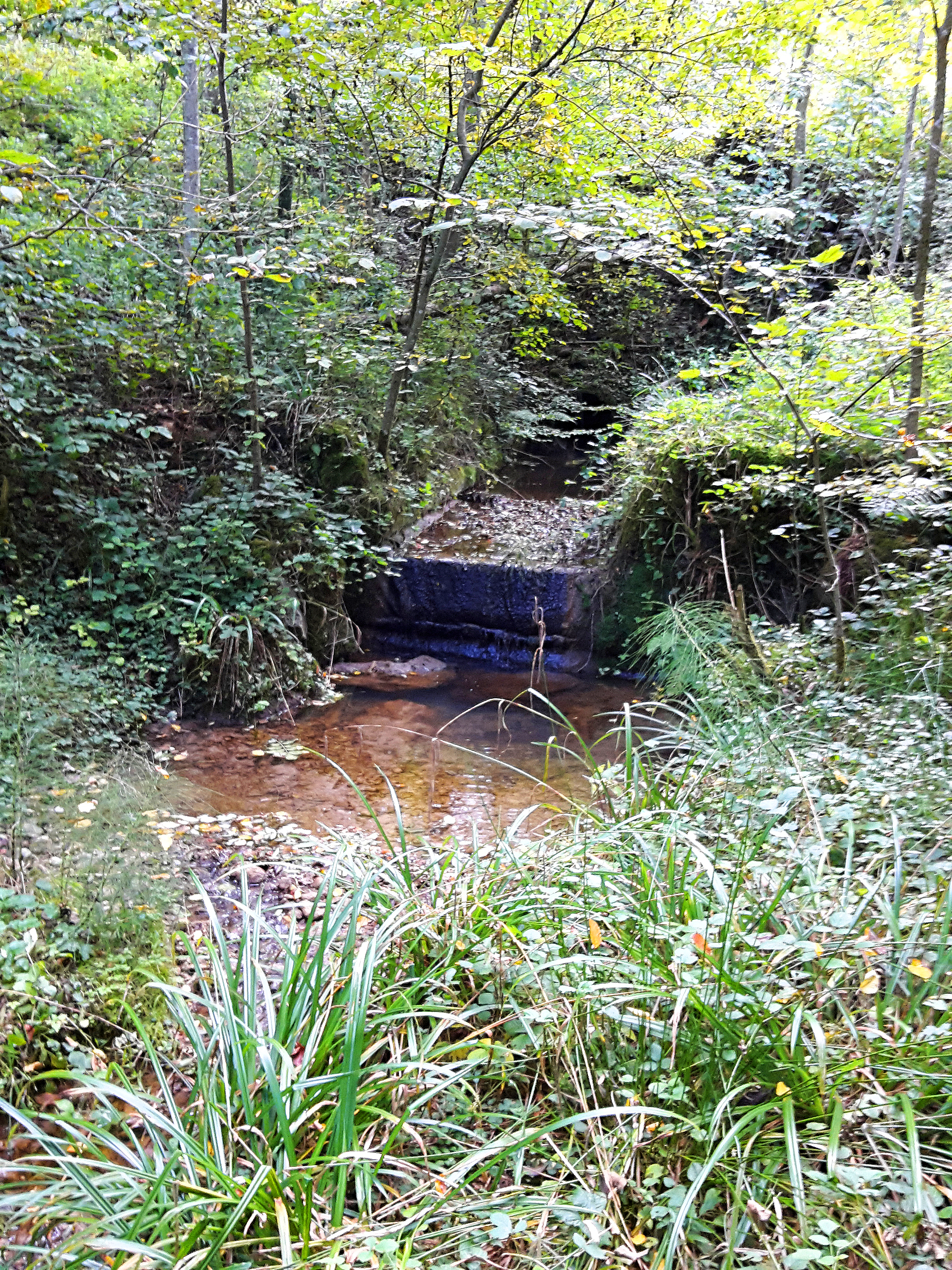 Geerenbach